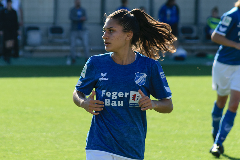 Leticia Santos de Oliveira